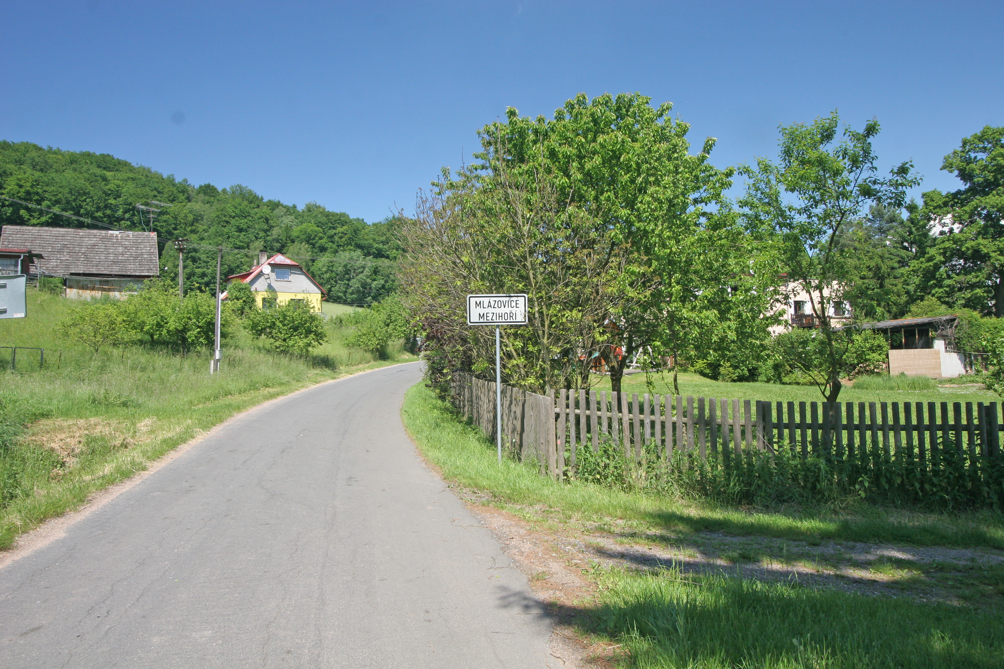 Mezihoří čp. 5